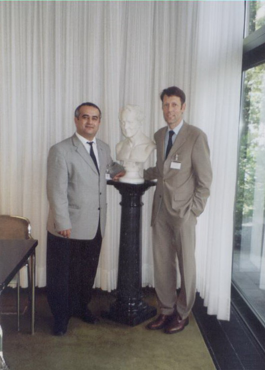 Alexander von Humboldt fondu